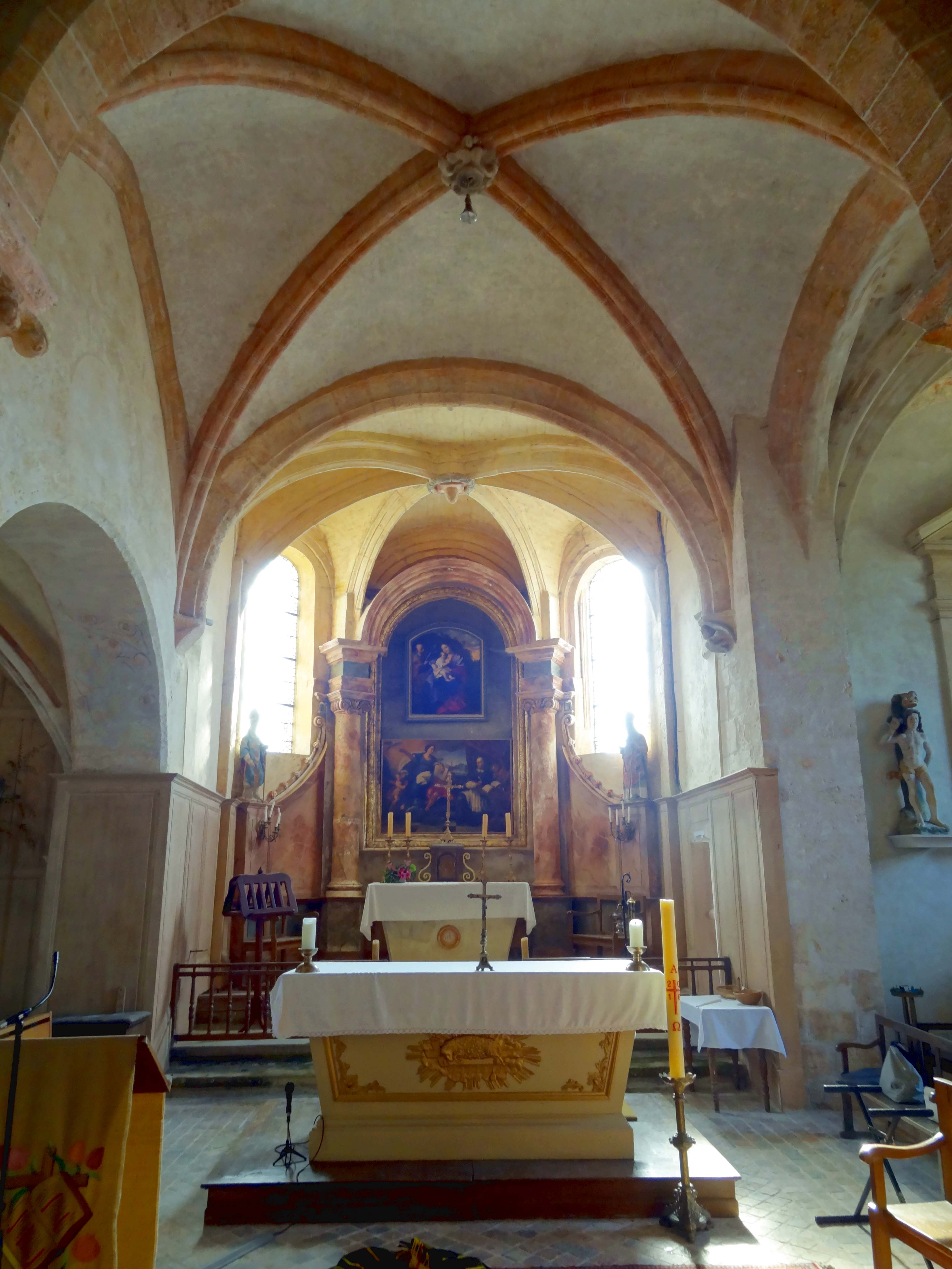 Intérieur de l'église - voir titre.